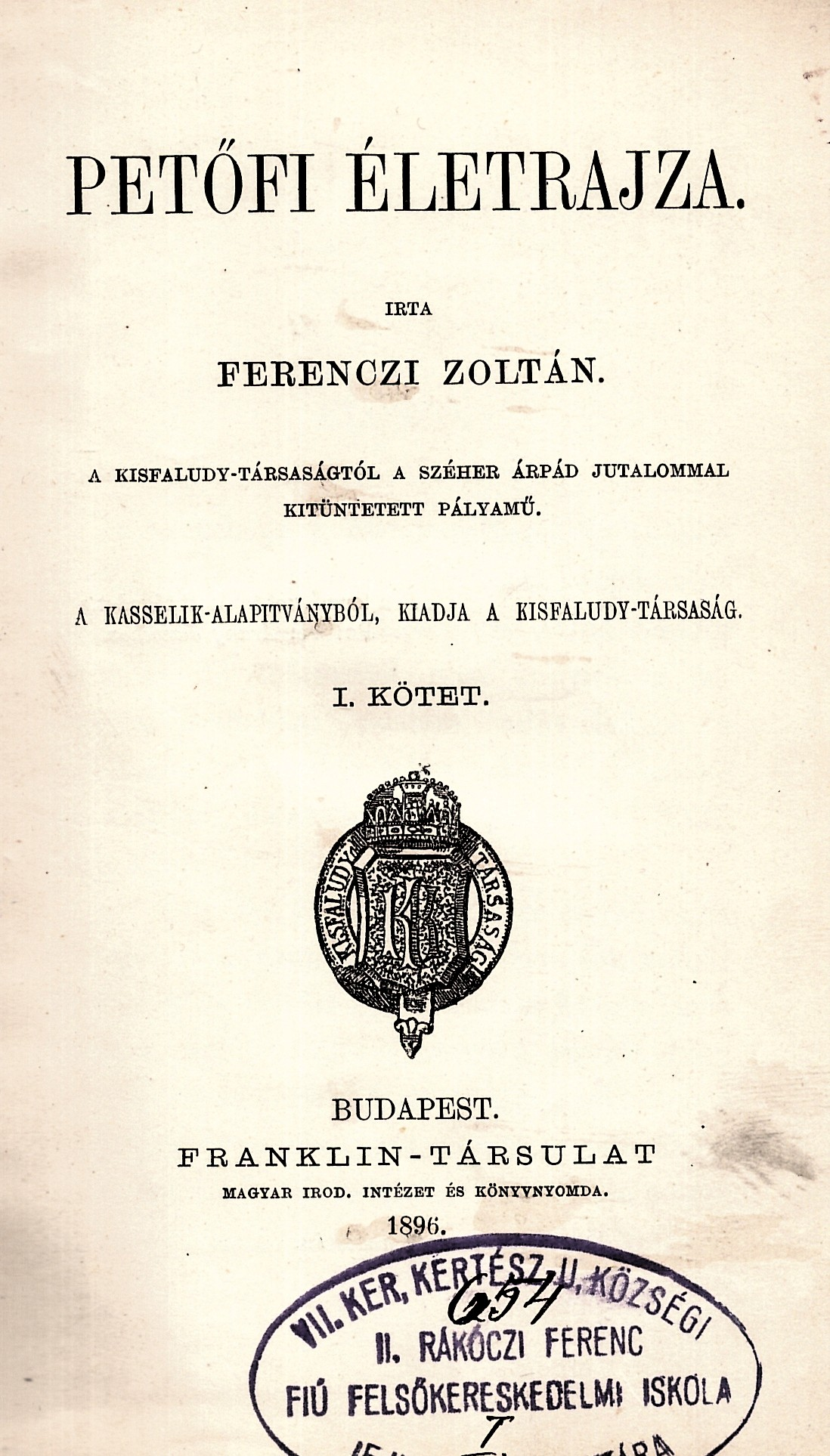 Ferenczi Zoltán (1857-1927): Petőfi életrajza (1896)